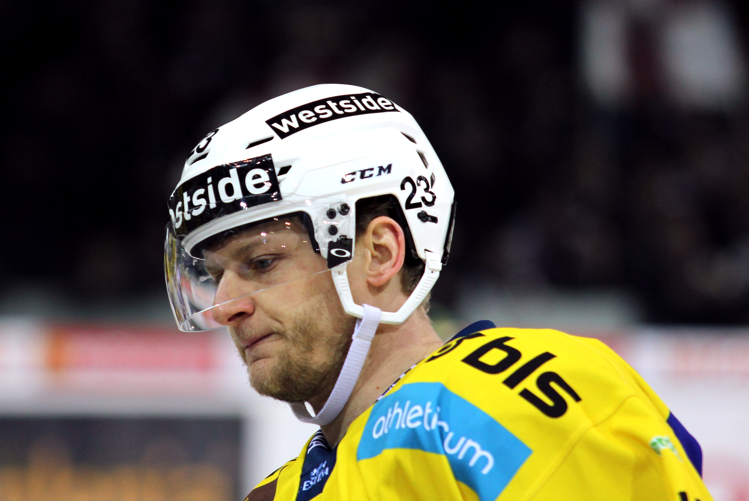 Simon Bodenmann (B 23).